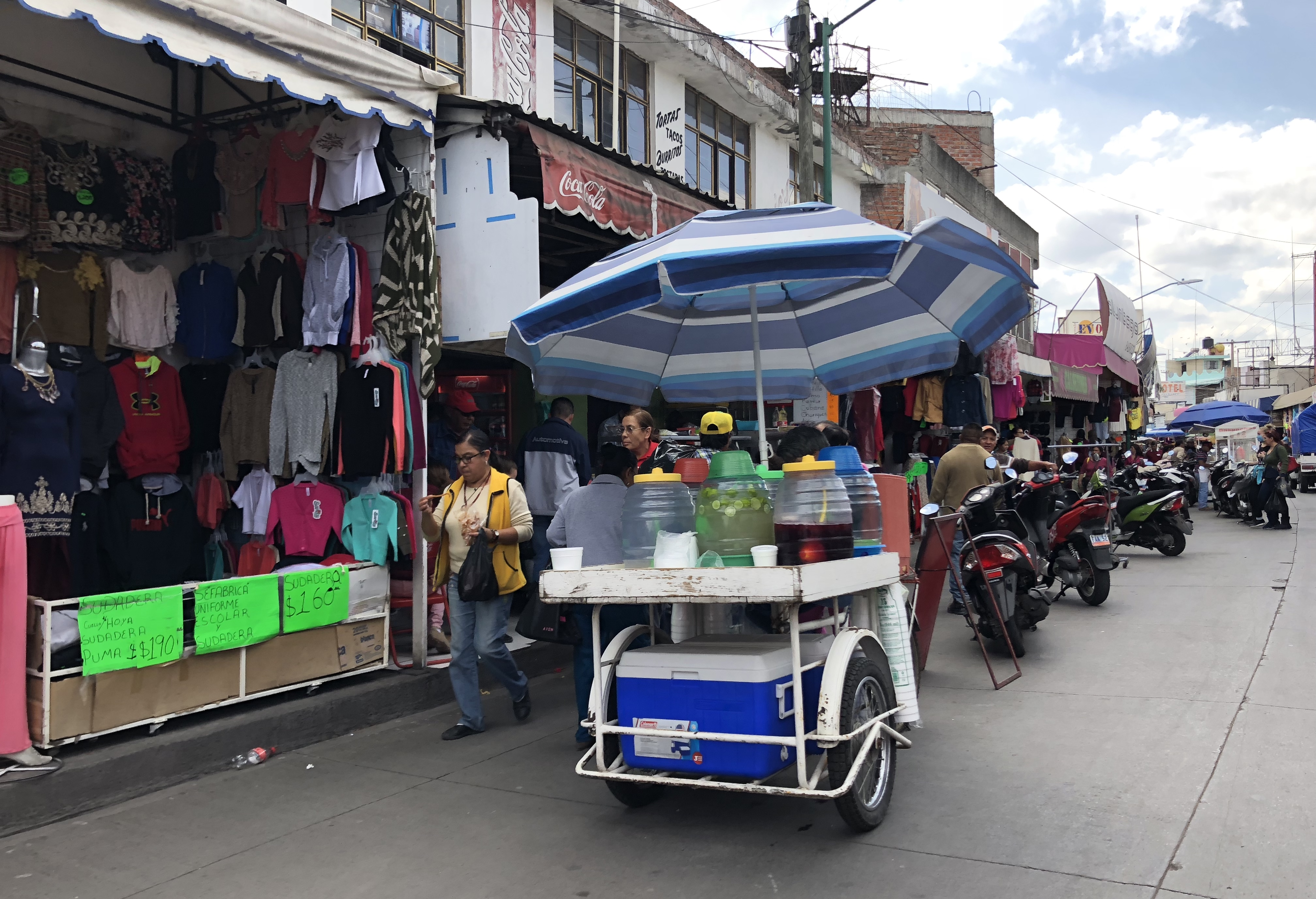 Zona Comercial Textil Uriangato en la Av. Álvaro Obregón, imagen que muestra los puestos de ropa de Uriangato.